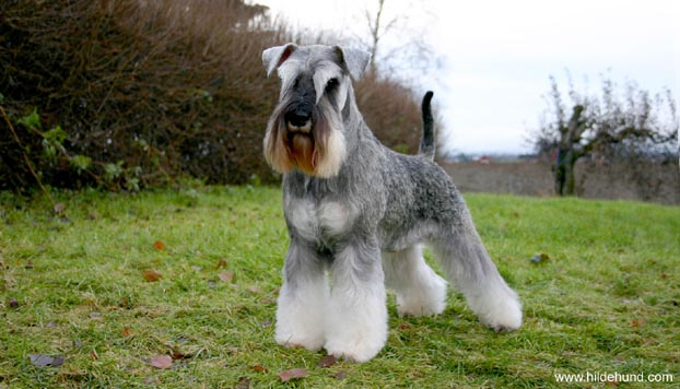 Dvergschnauzer salt/pepper